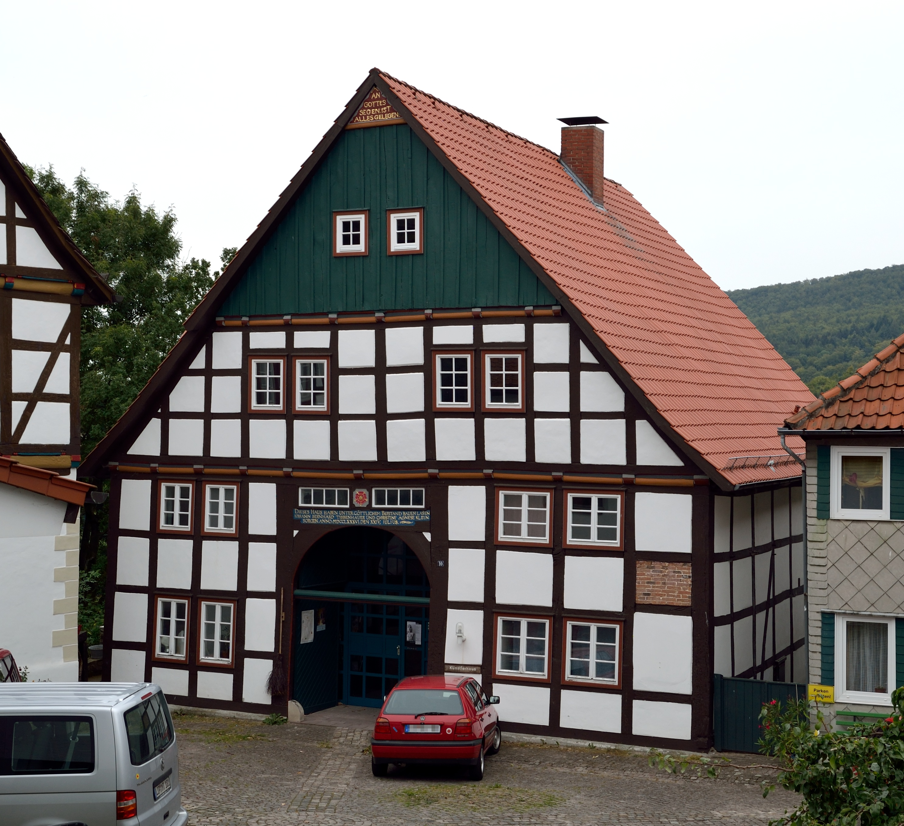 Schieder-Schwalenberg, Papenwinkel 10 This is a photograph of an architectural monument.